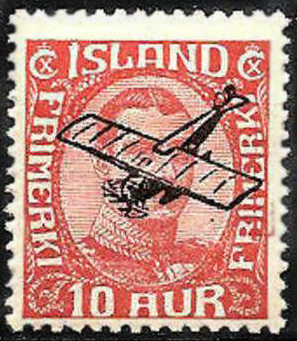 Первая авиапочтовая марка Исландии.